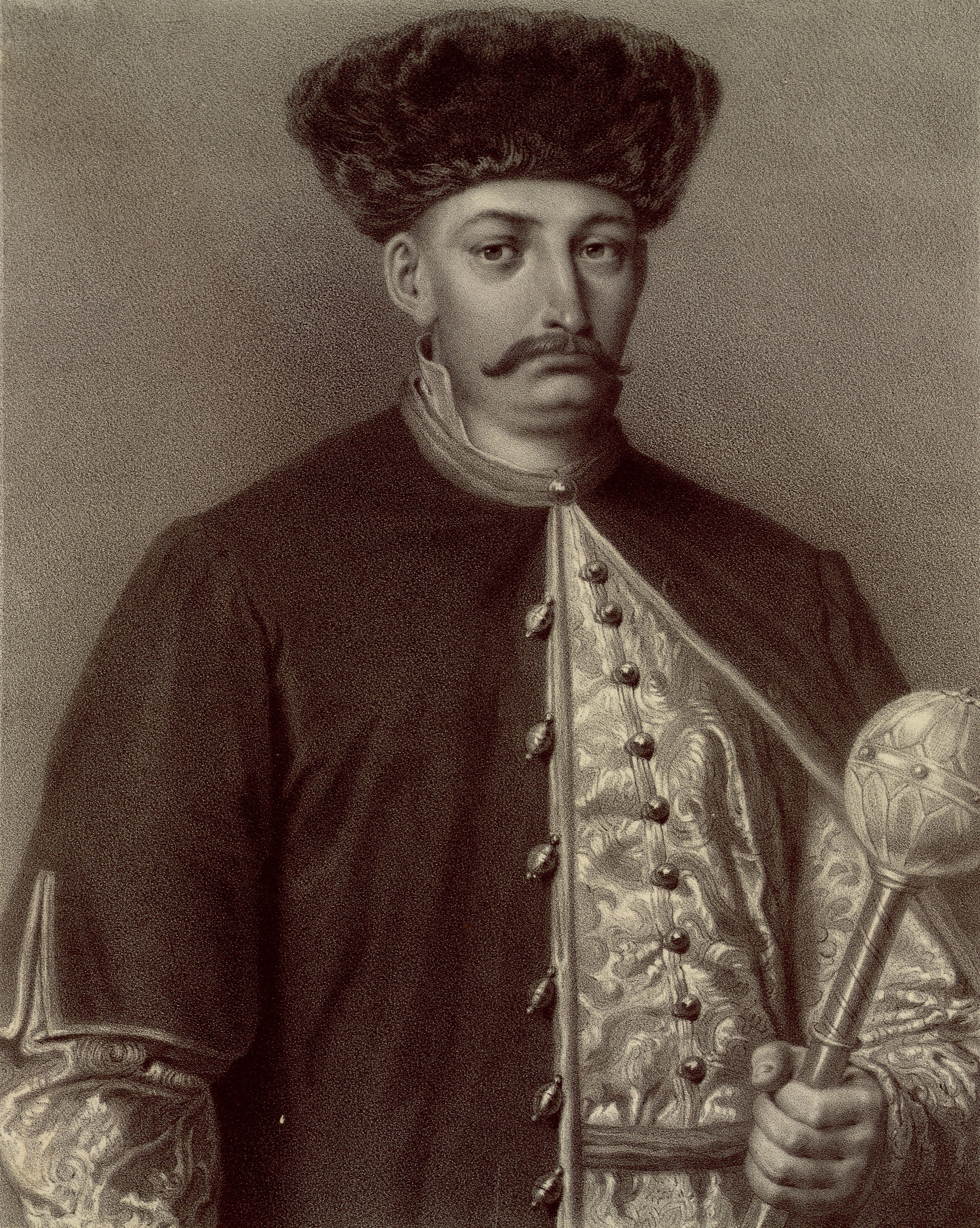 Беларуская (тарашкевіца): Партрэт Андрэя Сапегі (Andrej Sapieha) гербу «Ліс» (каля 1560 — 1621), дзяржаўнага і вайсковага дзеяча Вялікага Княства Літоўскага, падчашага вялікага, кашталяна менскага, ваяводы полацкага і смаленскага.